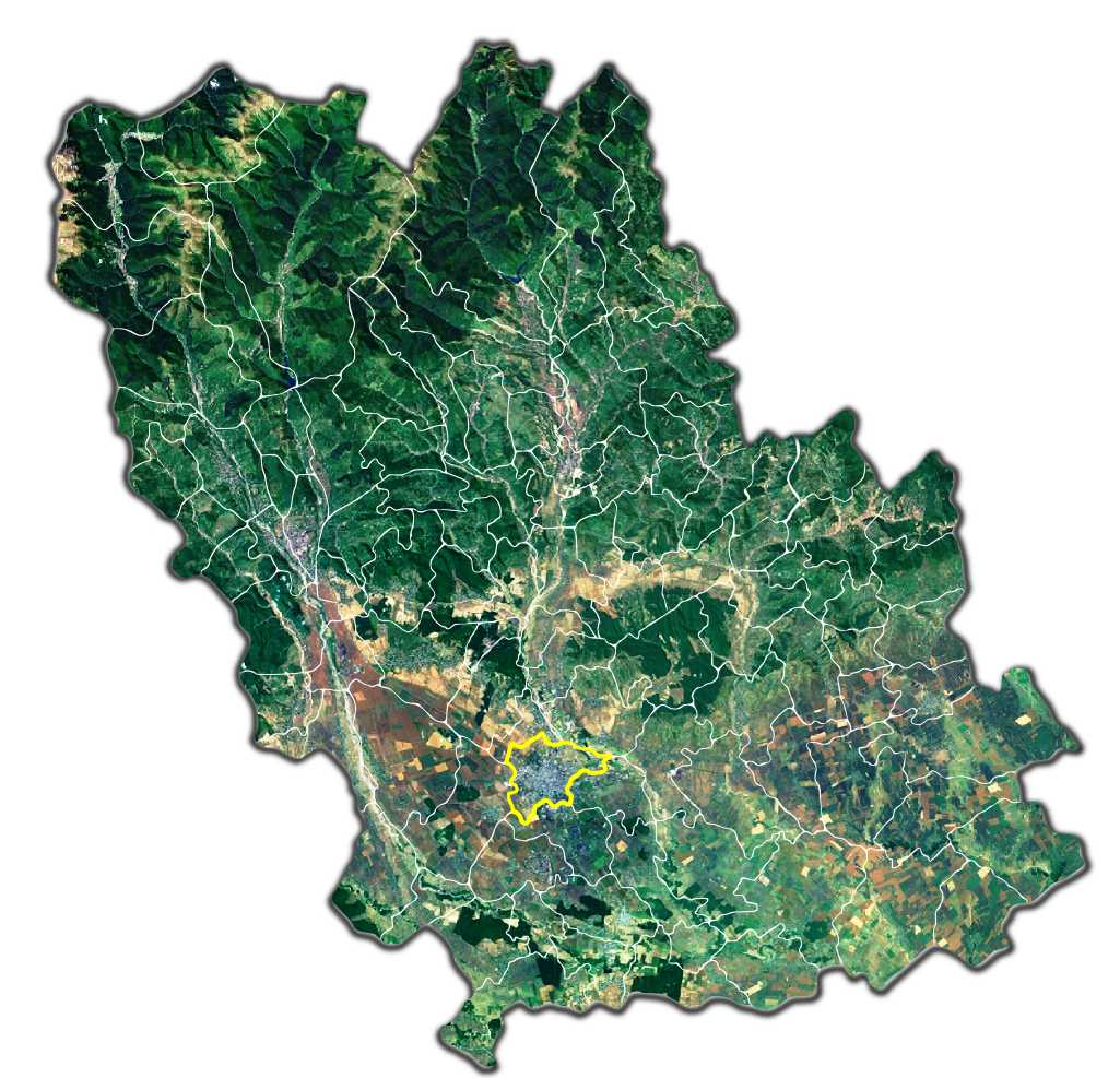 Ploiesti_jud_Prahova.